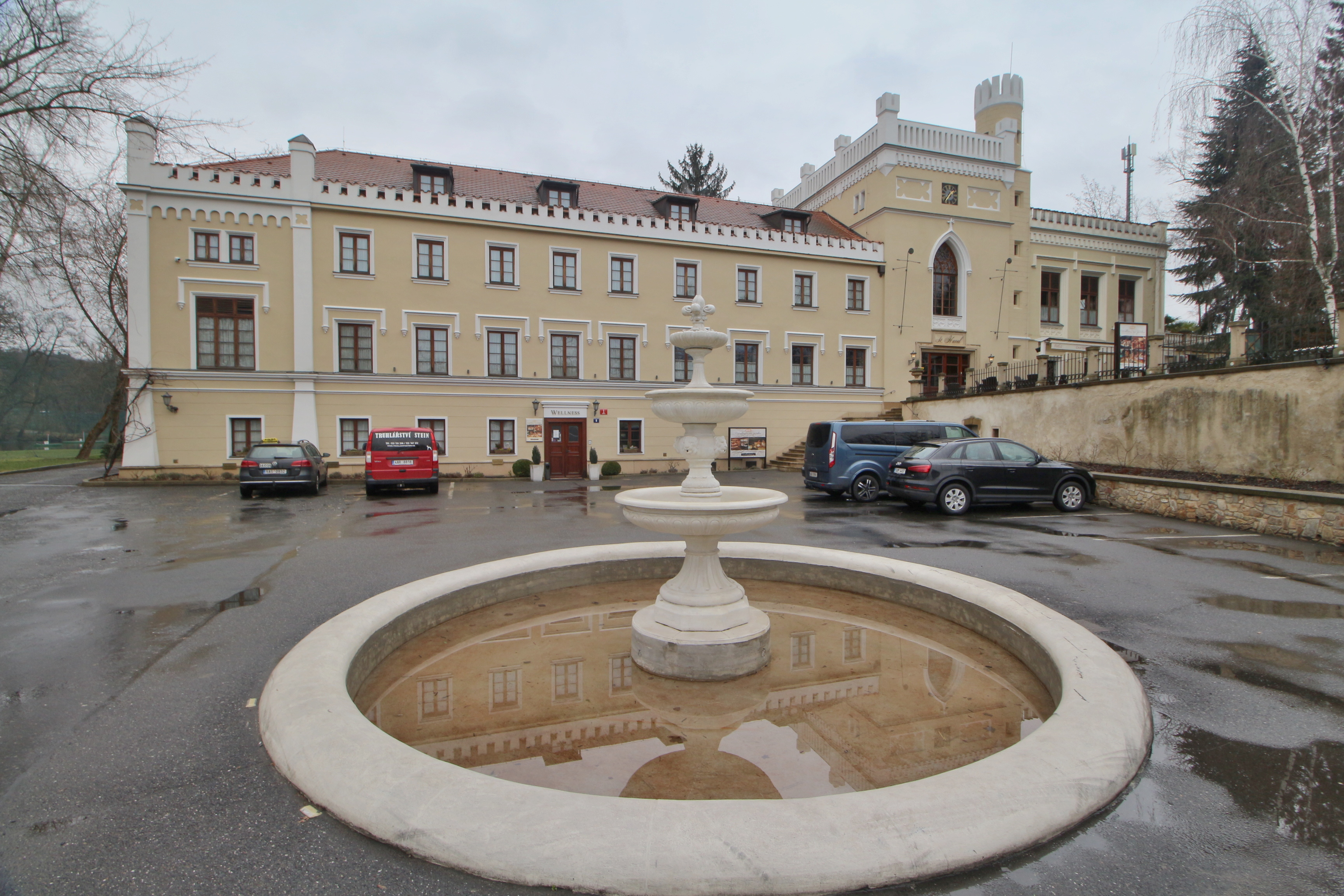 Krčský zámek sv. Havel